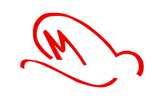 Esta Es La Firma de Mario